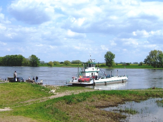 Fähre Rogätz (Sachsen-Anhalt)